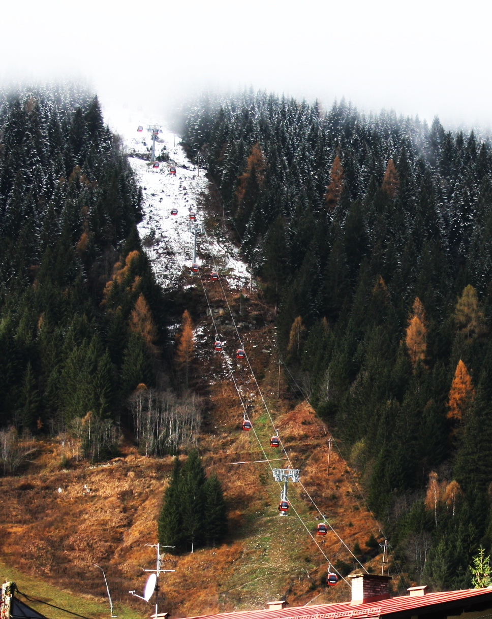 Seilbahn auf den Stubnerkogel (oder: Stubenkogel) in Bad Gastein.